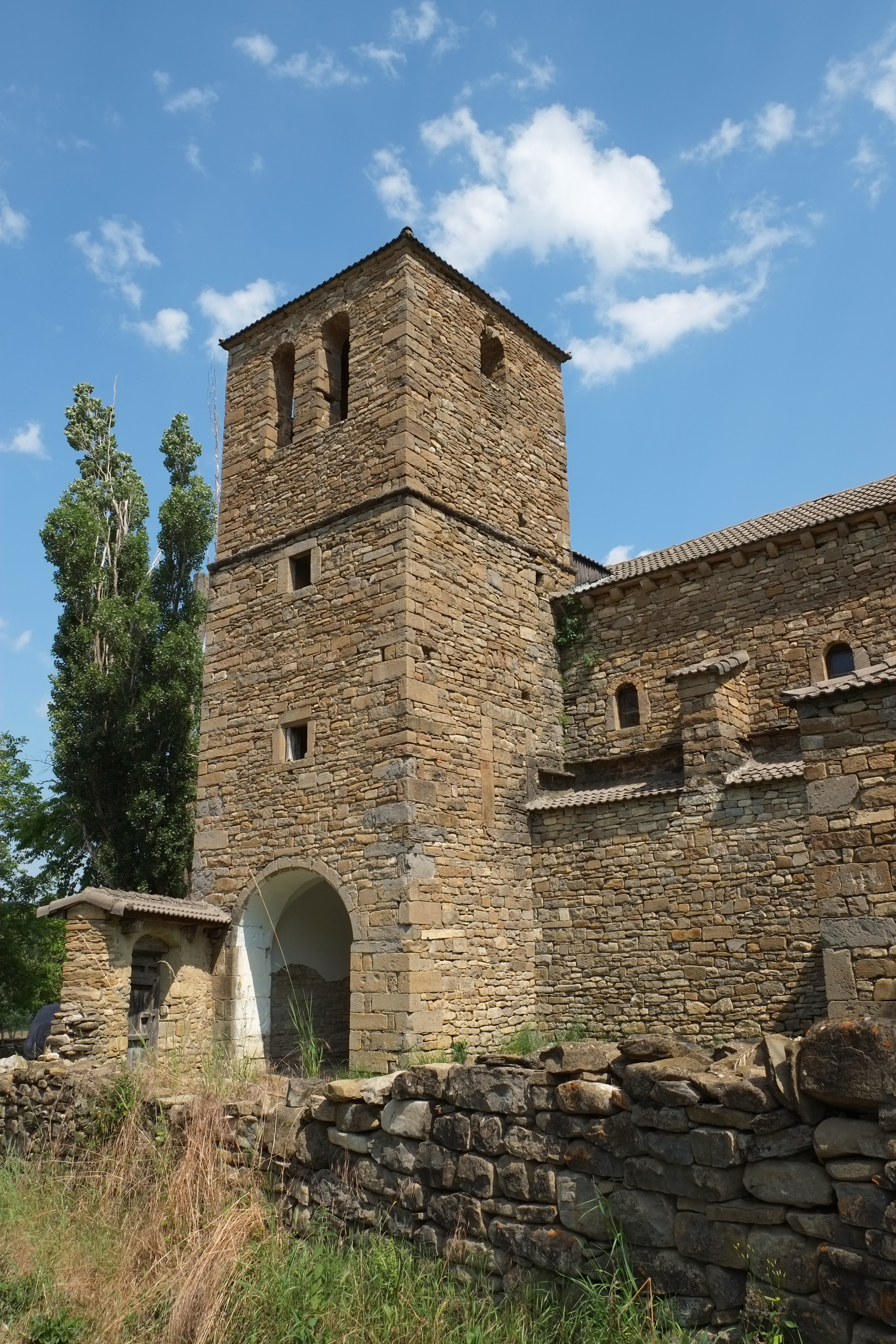 Kirche in Javierre del Obispo, einem Ort in der Provinz Huesca in Aragonien (Spanien)